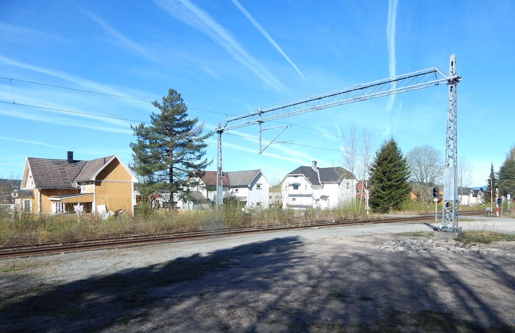 Stasjonsområdet på Eikonrød i 2015